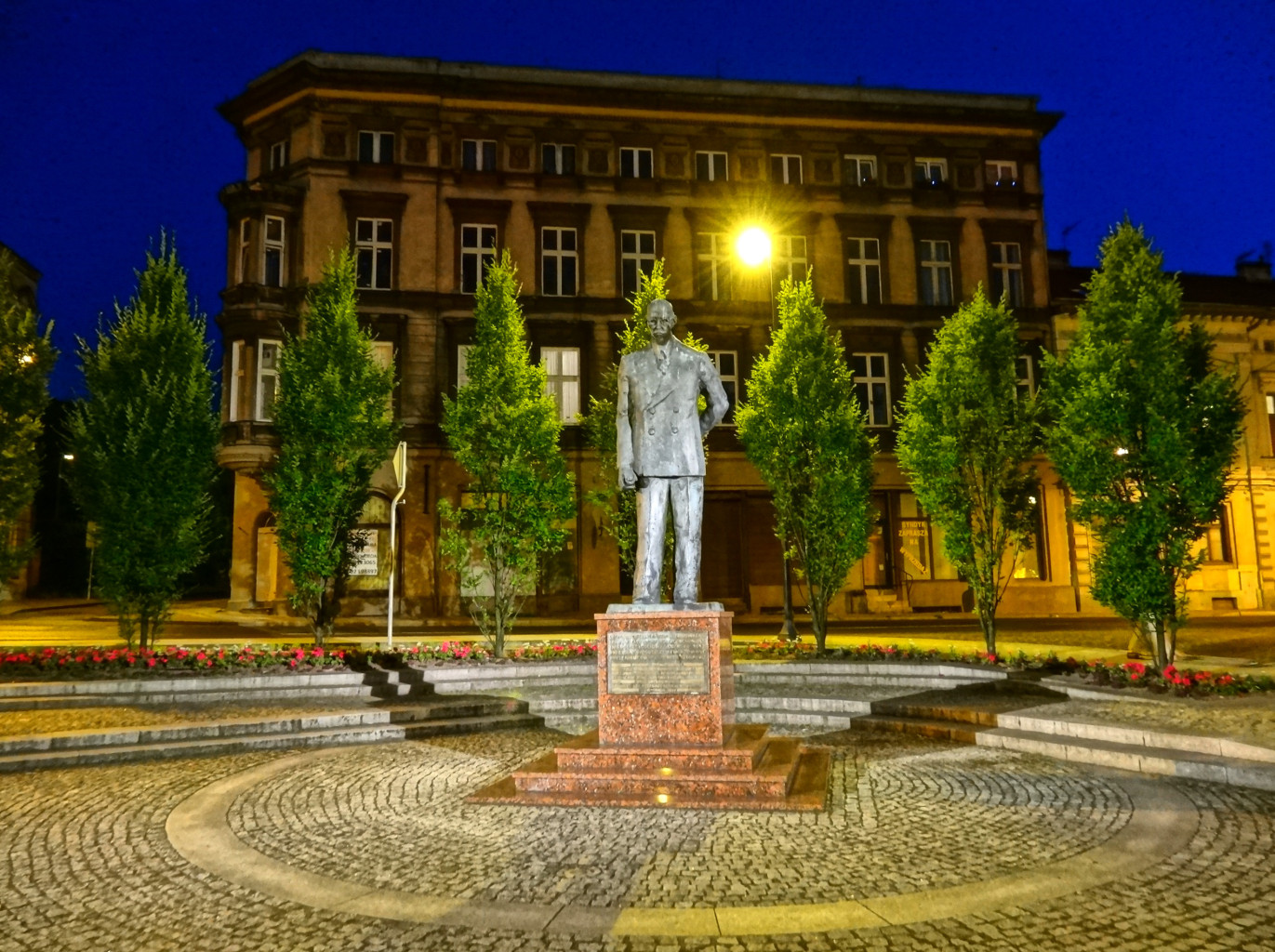 Pomnik przedwojennego prezydenta Bydgoszczy Leona Barciszewskiego ustawiony na Wełnianym Rynku